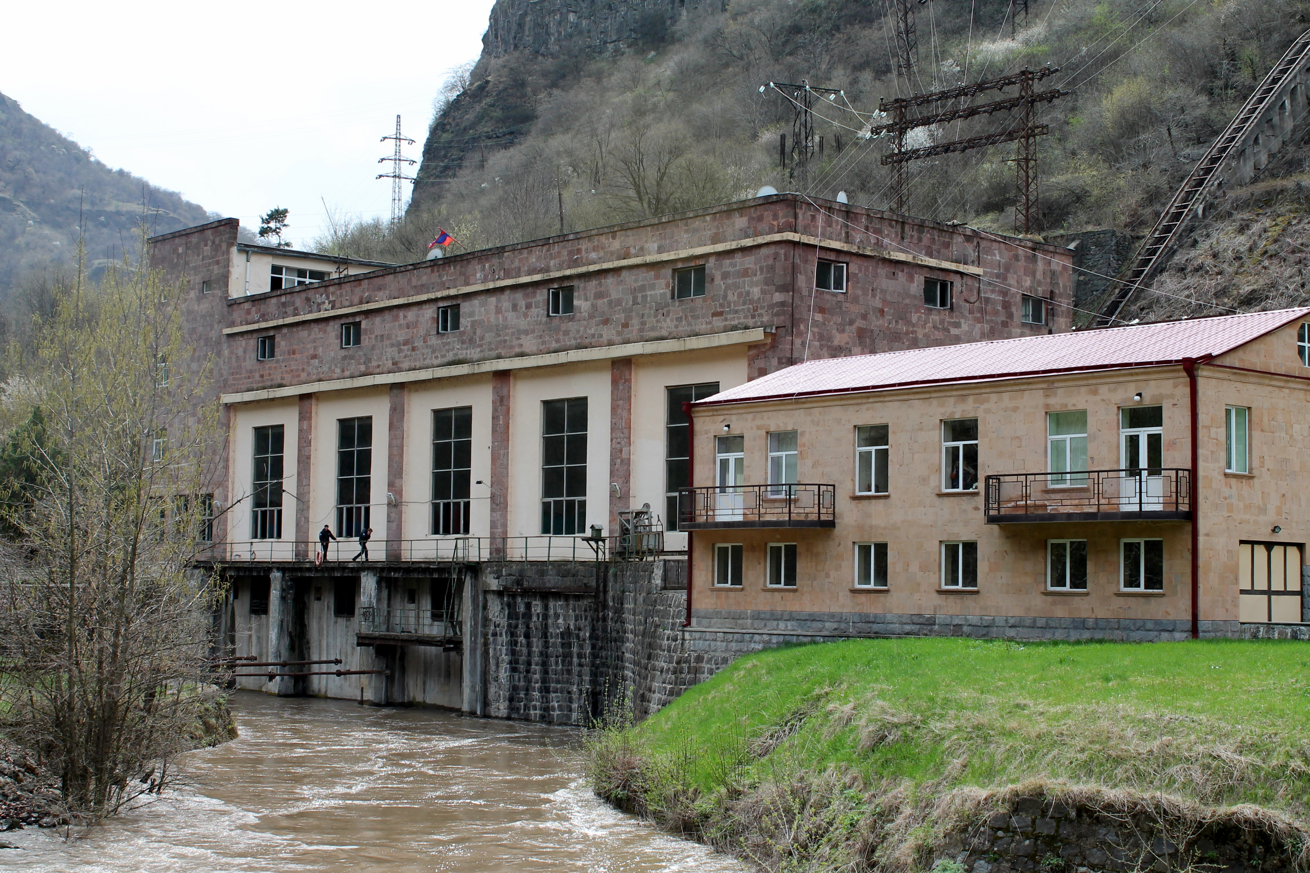 Здание Дзорагетской ГЭС